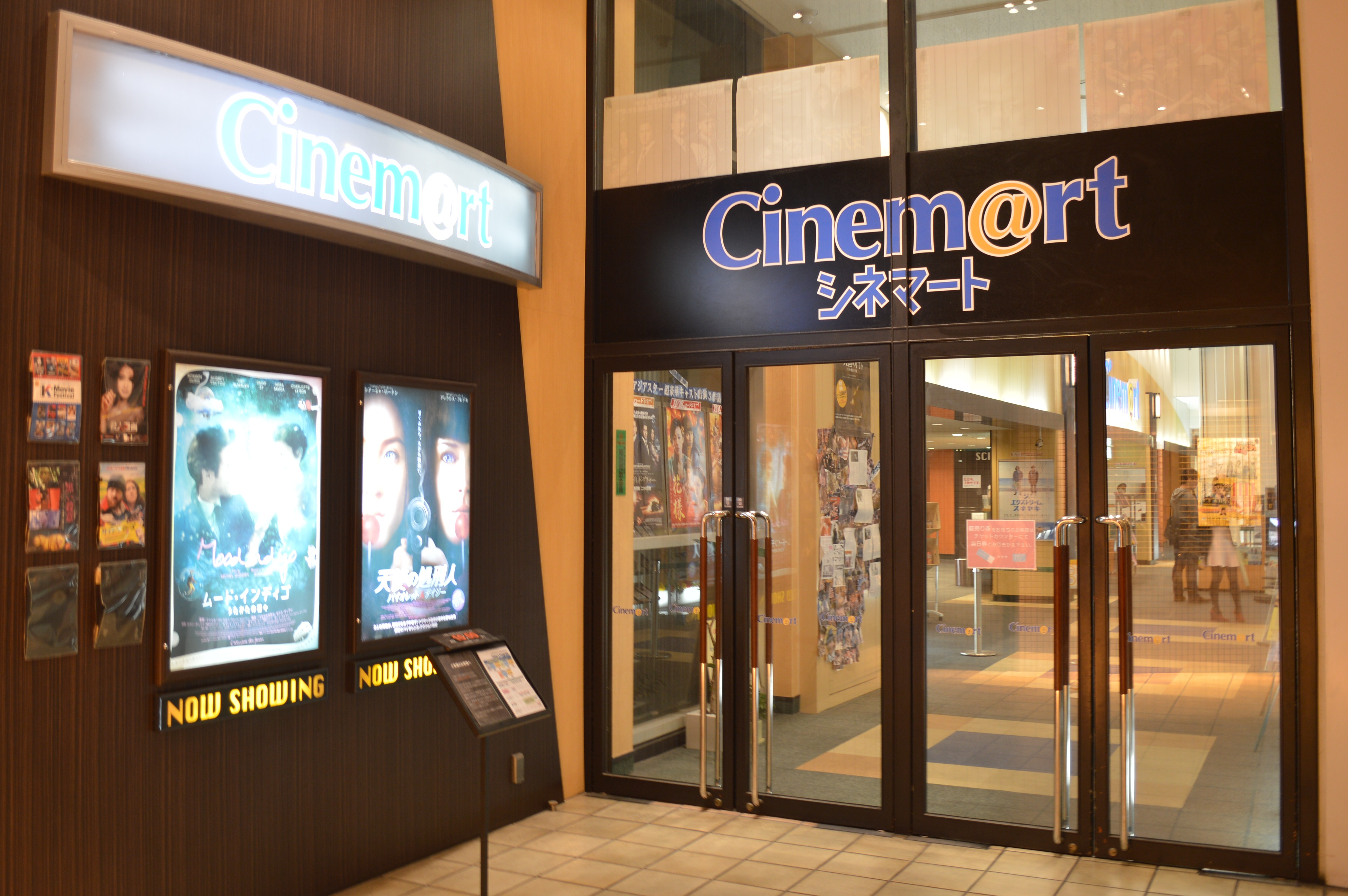 大阪府大阪市中央区西心斎橋にある映画館「シネマート心斎橋」